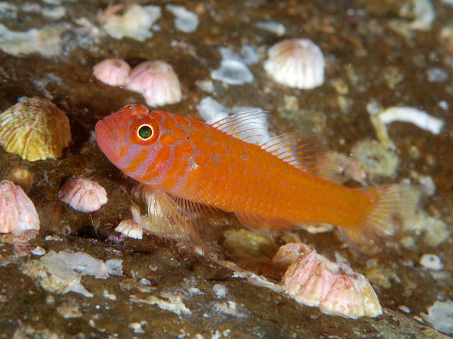 オキナワベニハゼ Trimma okinawae